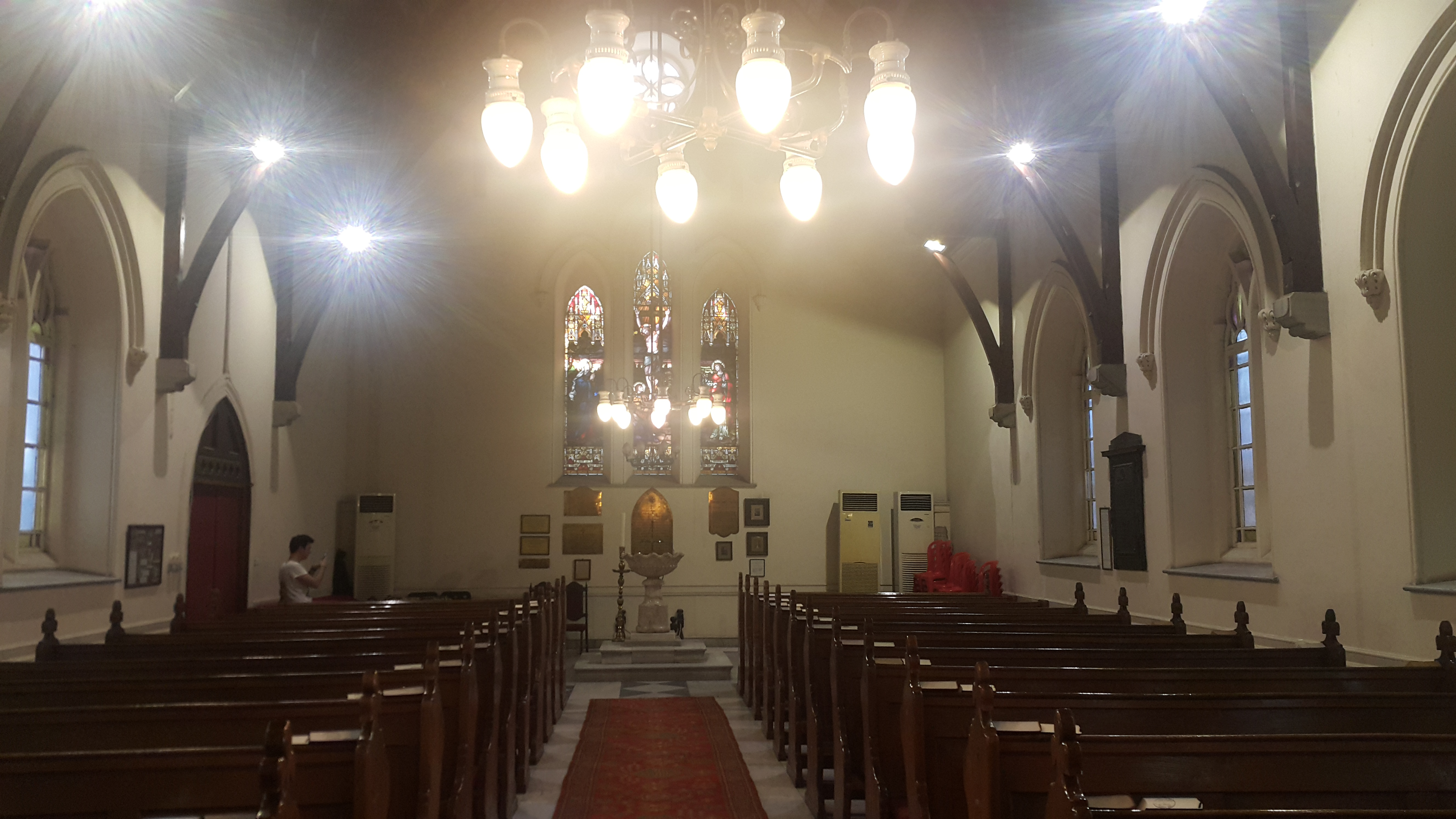 St. John the Evangelist's Anglican Church